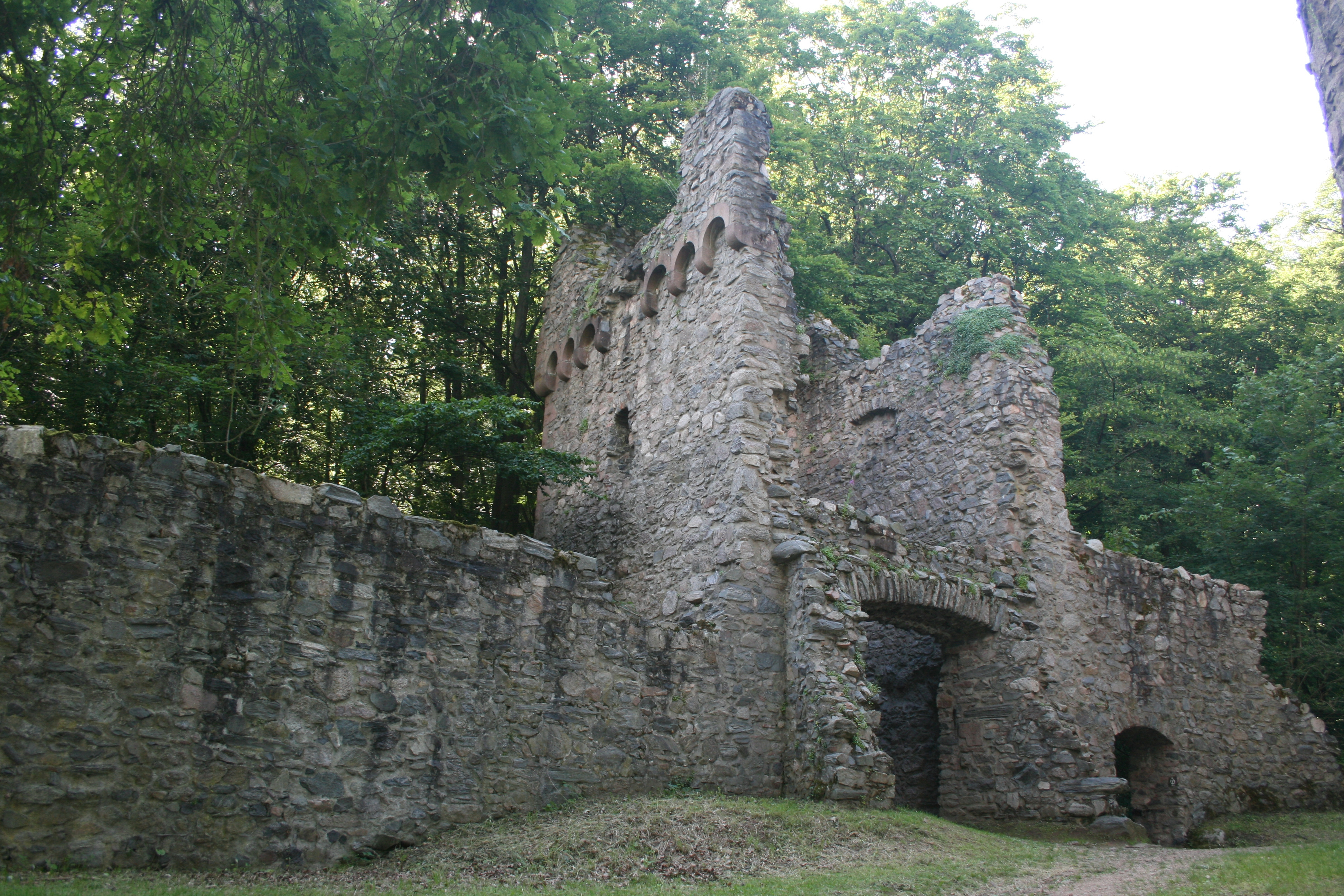 Burg Rodenstein, Ansicht der Innenseite des sog. Mühlturms an der westlichen Burgmauer.